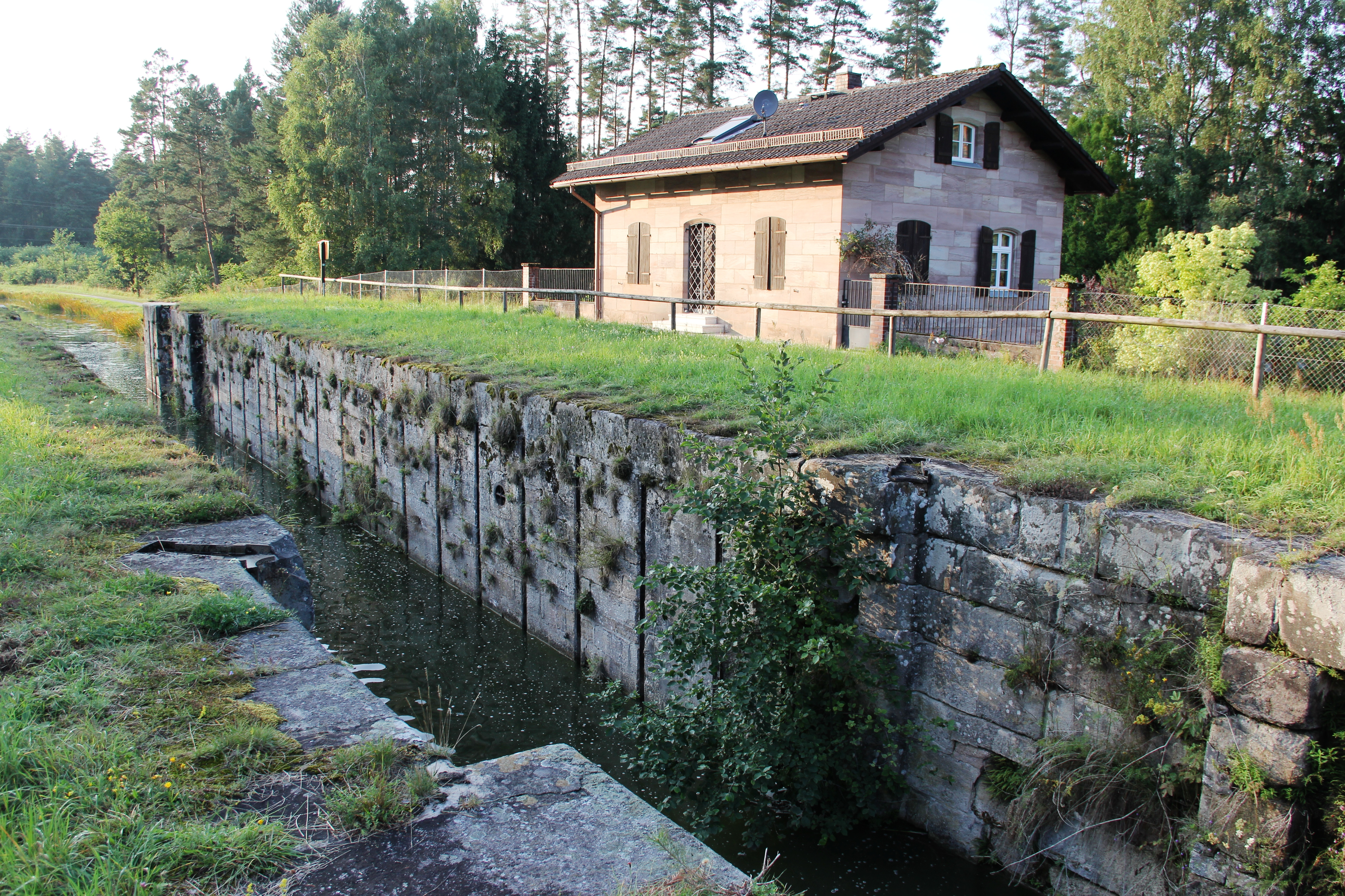 Ludwig-Donau-Main-Kanal, Schleuse 55